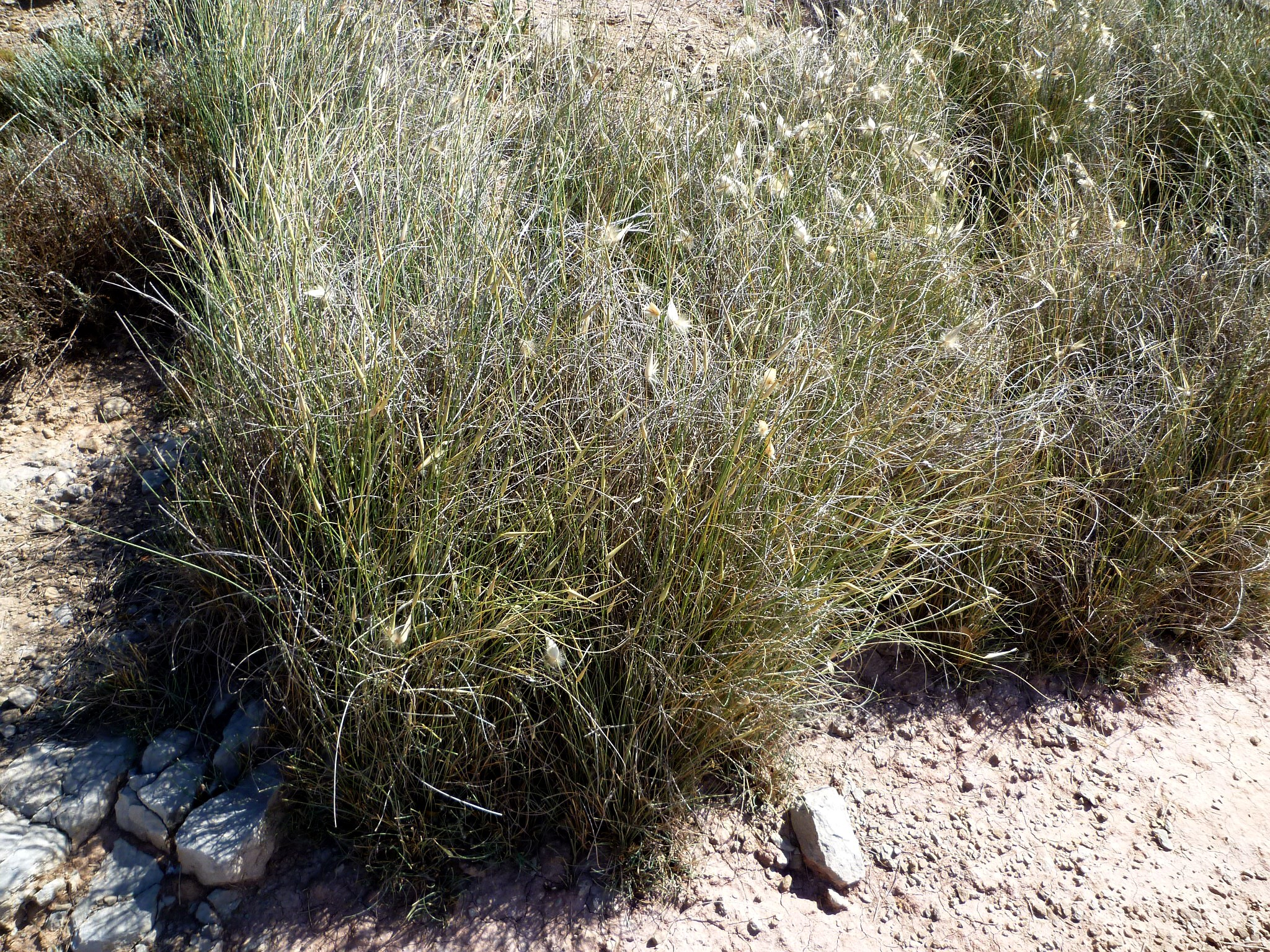 Clot dels Reguers (els Plans de Sió - Segarra): vegetació típica: espart bord (Lygeum spartum), a 400 m. d'altitud This is a a photo of a wetland in Catalonia, Spain, with id: IZHC-18003201